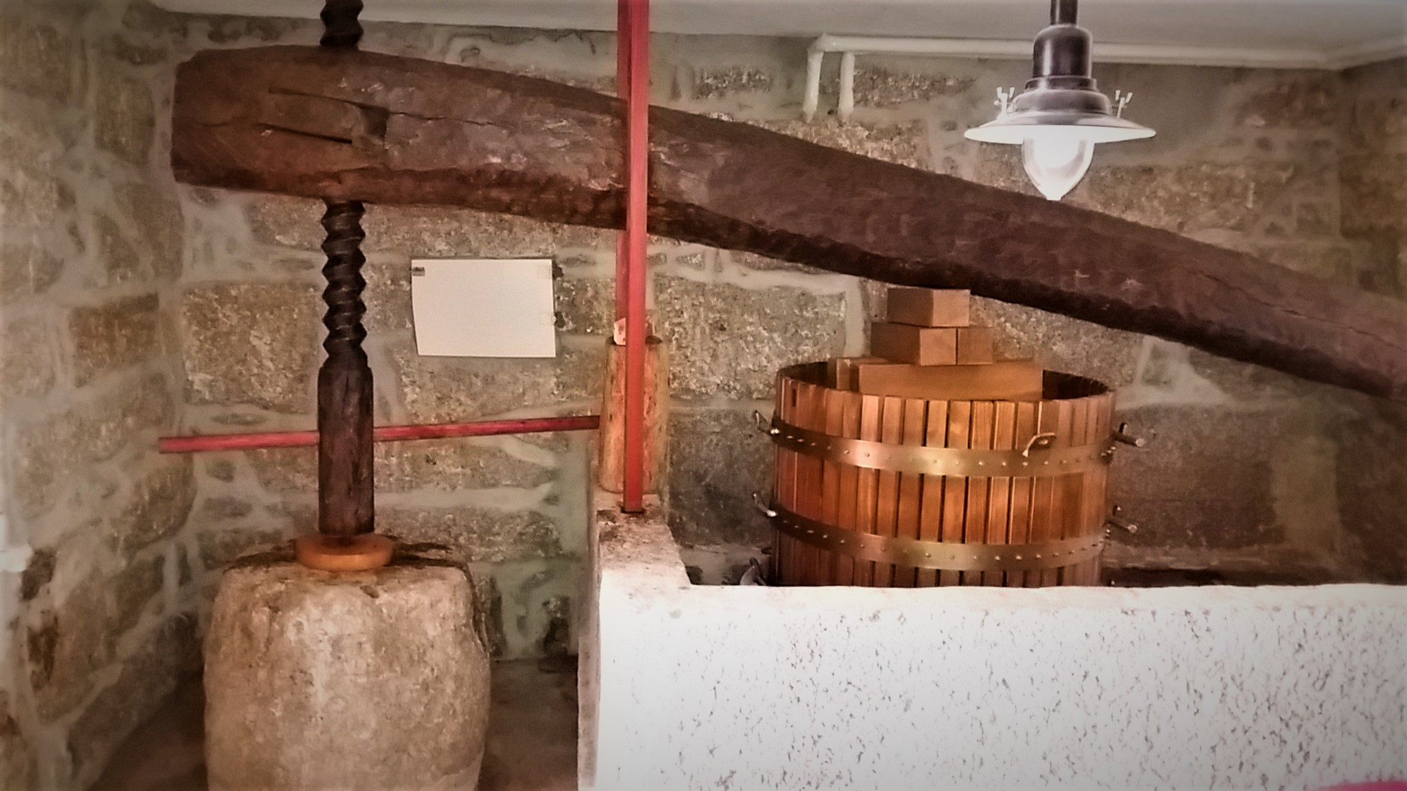 Prensa de vara de 1890, existente na Adega da Vara (Castelo de Paiva - Portugal), utilizada para fazer o vinho Consorte. Compõe-se de vara e fuso, sendo ambas as peças feitas de madeira maciça. A pedra existente na extremidade inferior do fuso pesa cerca de 1 ton. No interior do lagar existe um cincho (ou caniça), em cujo interior são colocadas as uvas a prensar.